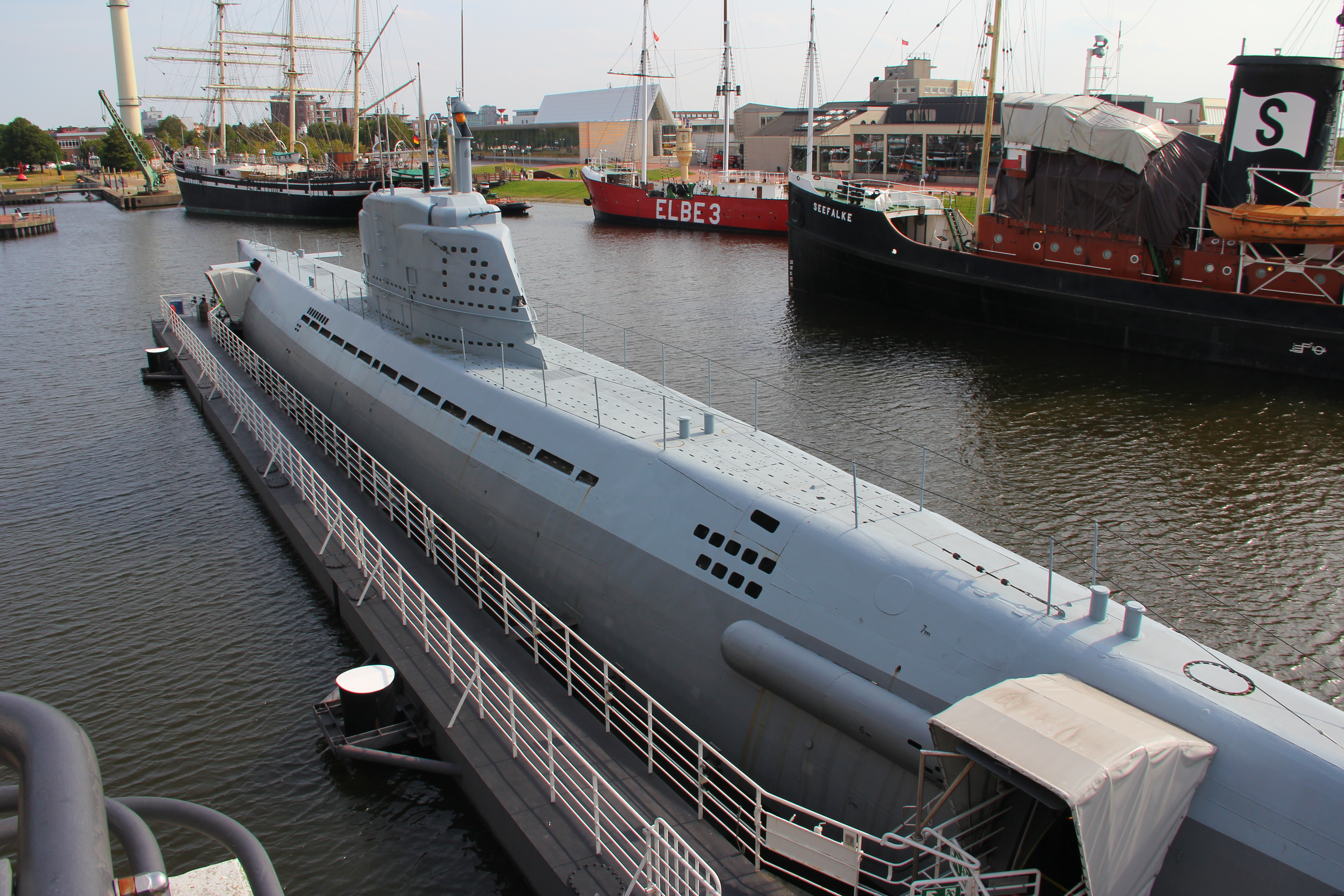 U-Boot Typ XXI U-2540 ("Wilhelm Bauer")